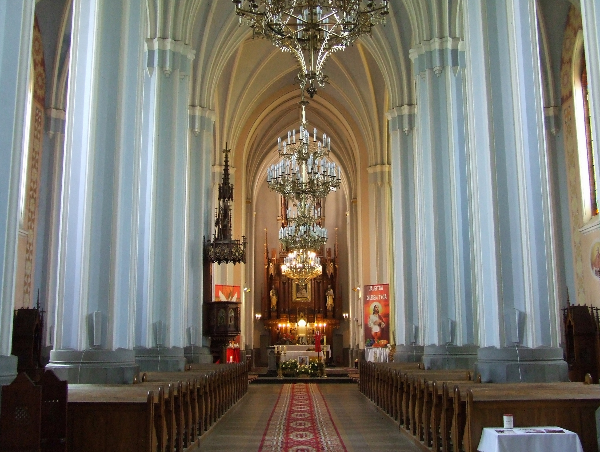 Nawa główna kościoła w Baranowie (powiat ostrołęcki)